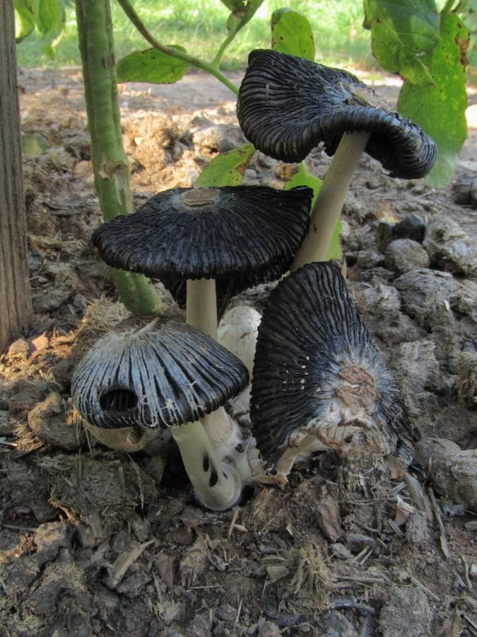 Coprinus sterquilinus (Fries) Fries